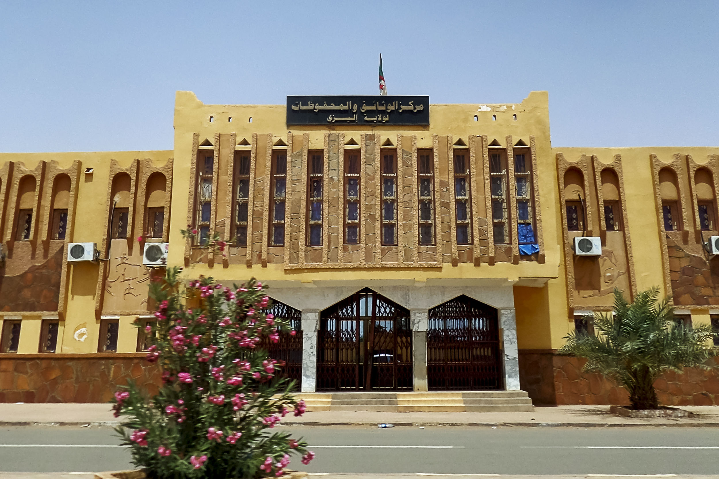 Illizi مركز الوثائق و المحفوضات